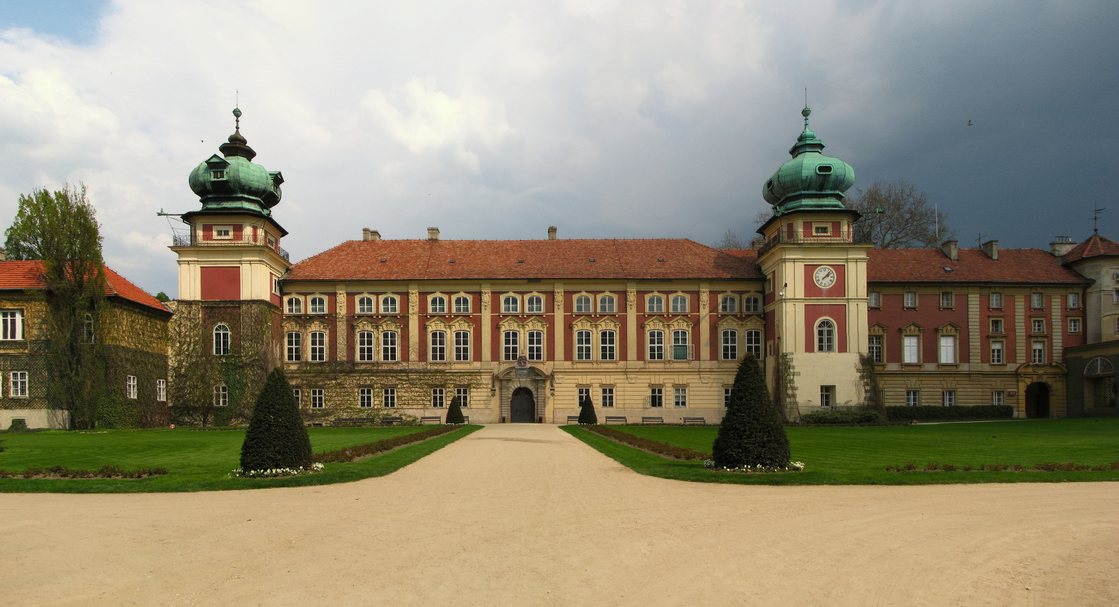 Łańcut - Zamek Lubomirskich i Potockich